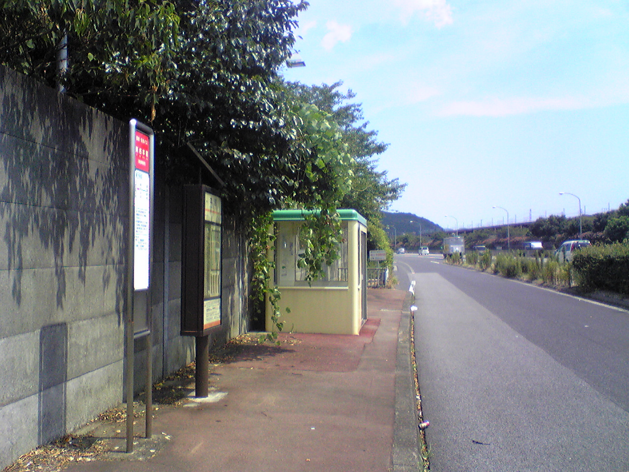 東名ハイウェイバスの本宿バスストップ。高速上での上り線側の様子。